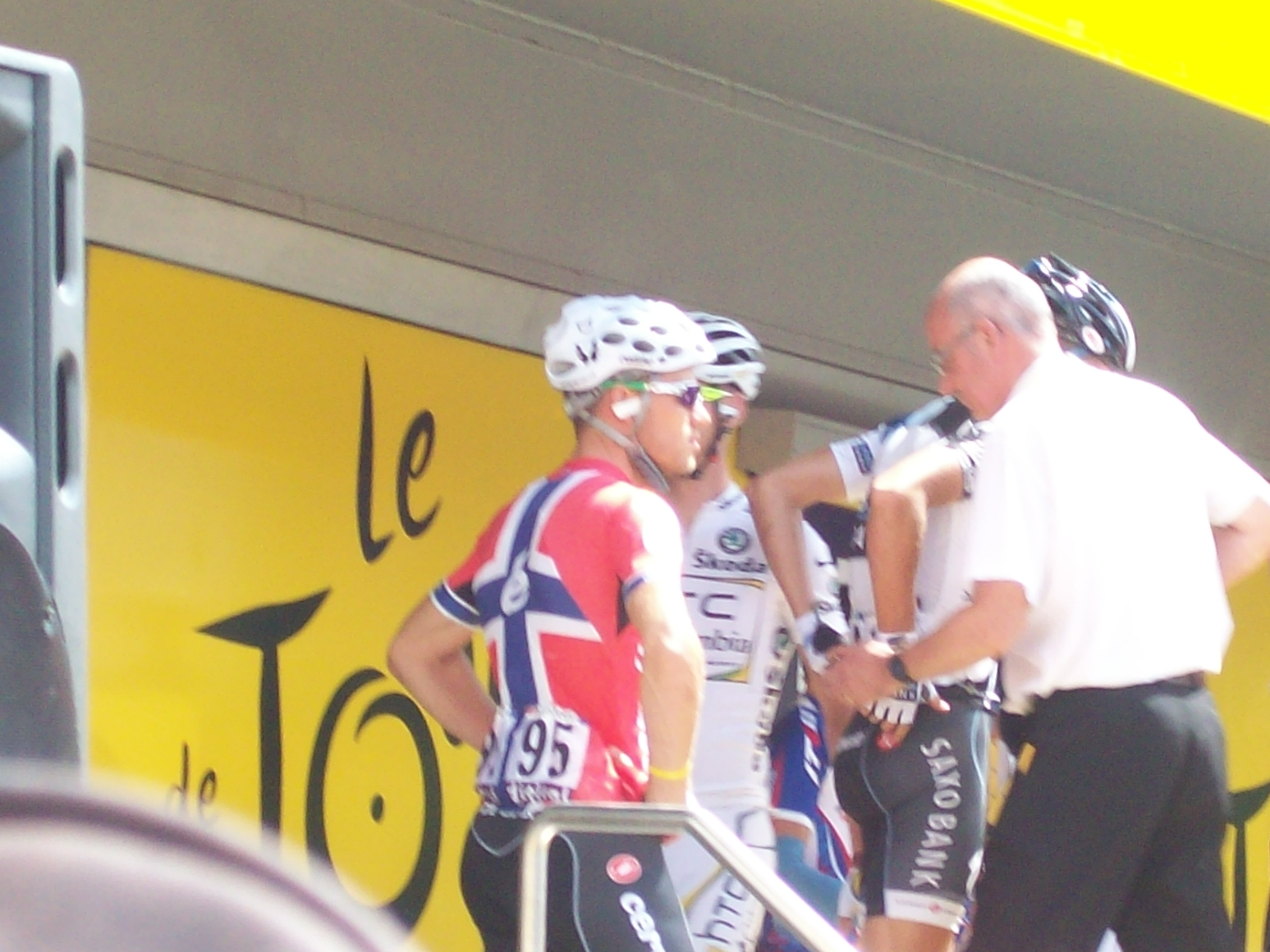 Thor Hushovd au départ de la 3e étape du Tour de France 2010 à Wanze, province de Liège, Belgique.